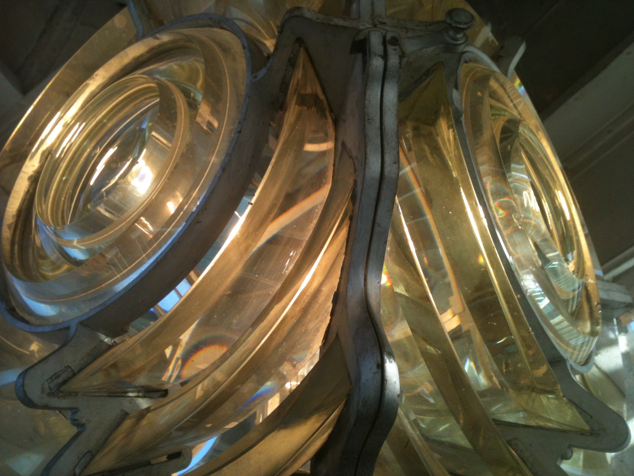 Les lentilles de 1894, toujours en activité)